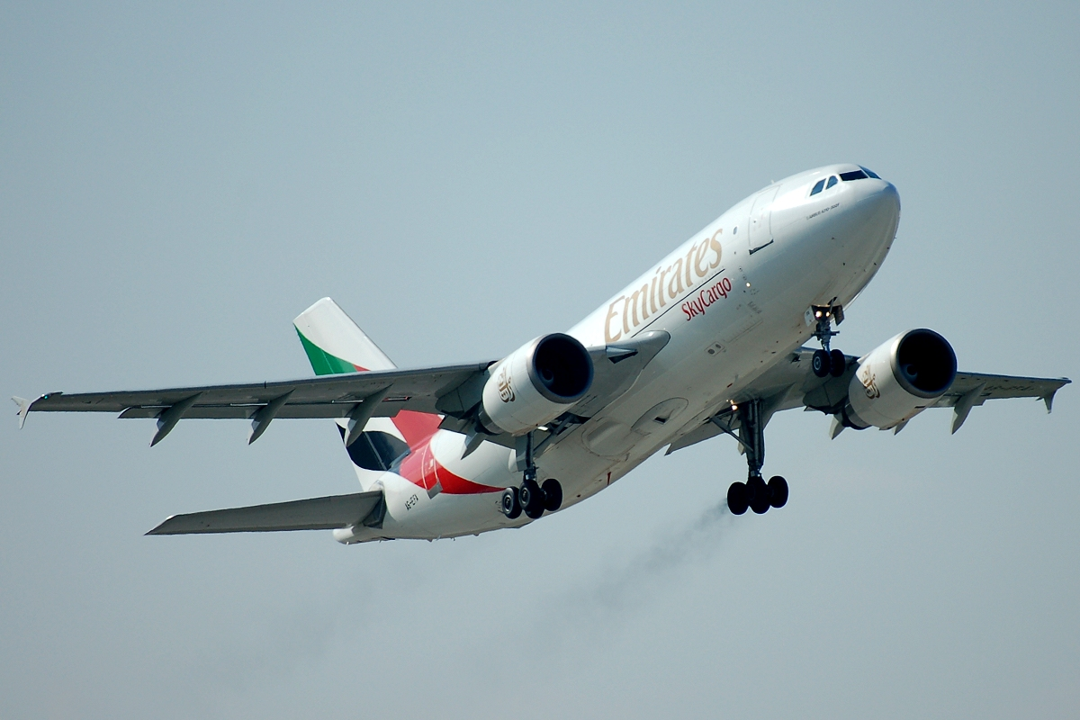 Emirates Sky Cargo Airbus A310